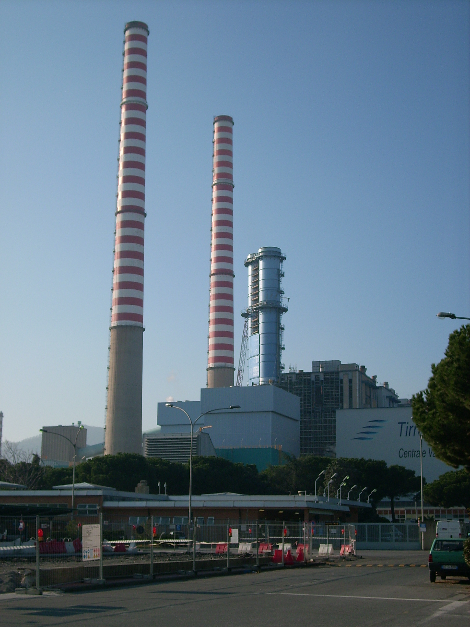 Centrale Enel "Tirreno Power" di Vado Ligure, Liguria, Italy